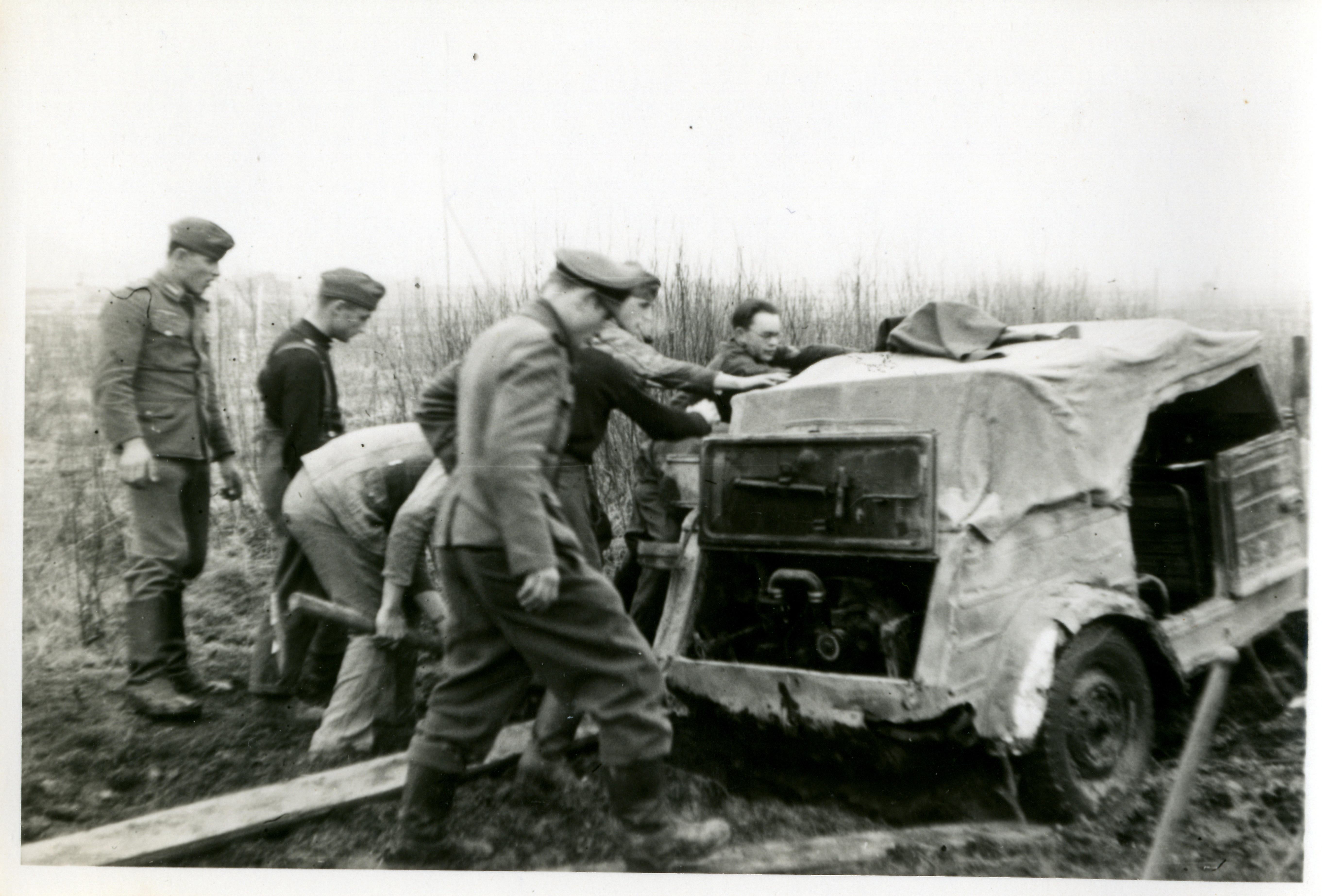 Bildet er hentet fra Arkivverket. Foto fra Narvafronten, tilhørende landssviksak med domsnummer 2506, Oslo Politikammer. Berging av fastkjørt bil. Arkivinstitusjon : Riksarkivet Arkivnavn : Landssvikarkivet Sted : Estland, Ukjent, Ukjent, Narva Emneord: Krig, Narvafronten, Menn, Frontkjempere, Andre verdenskrig, 2. verdenskrig Avbildet